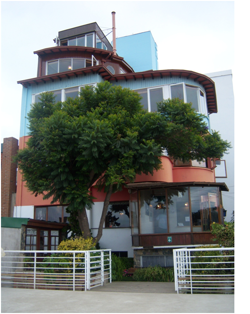 Fotografía tomada en Valparaíso. Casa de Pablo Neruda conocida como La Sebastiana. Febrero 2009